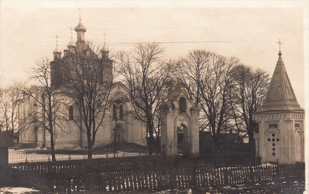 Беларуская (тарашкевіца): Койданаў (Kojdanaŭ), рог вуліц Станькаўскай (vulica Stańkaŭskaja) і Слуцкай (vulica Słuckaja). Пакроўская царква-мураўёўка